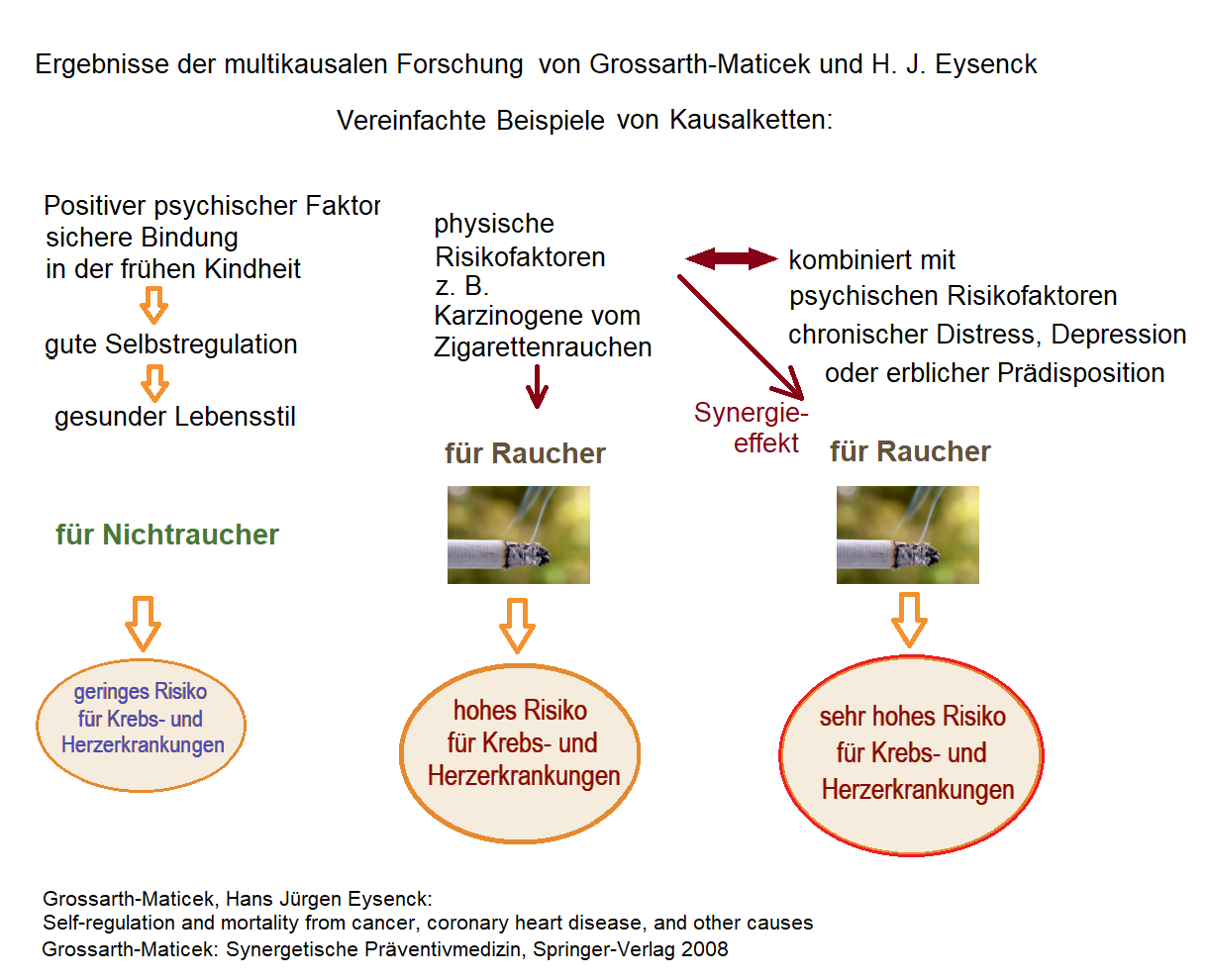 Ergebnisse der multikausalen Forschung, Vereinfachte Kausalketten zu Gesundheit, Krebs- und Herzerkrankungen